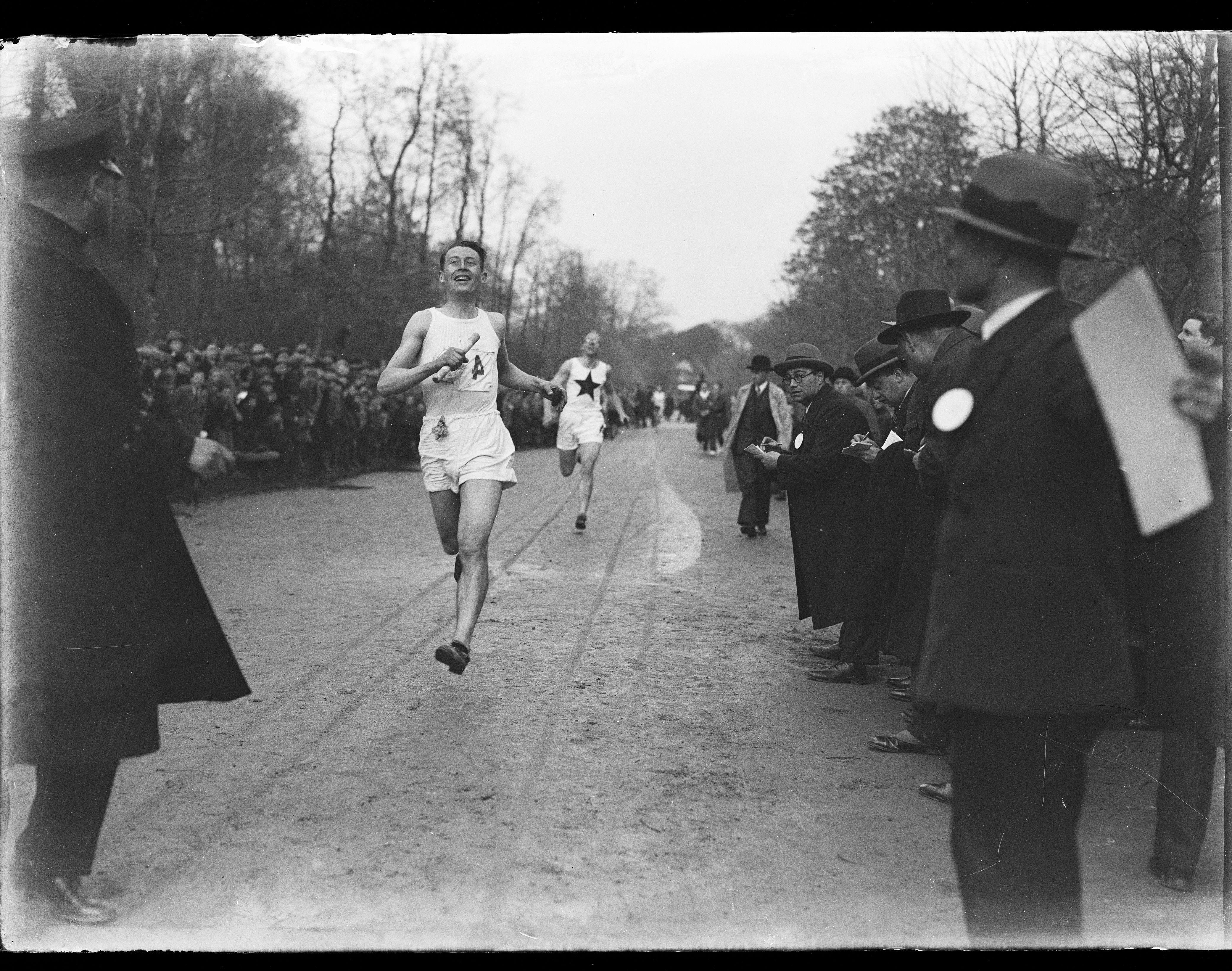 Beschrijving Hardloopwedstrijd Jan Zeegers jr., de zoon van fotograaf Jan Zeegers, wint de Kalfjeslaan 2 km race. Documenttype foto Vervaardiger Zeegers, Jan Collectie Collectie Jan Zeegers Datering 1923 Inventarissen Afbeeldingsbestand 010029000591 Generated with Dememorixer